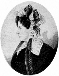 Anna Fredrika Ehrenborg (1794-1873)